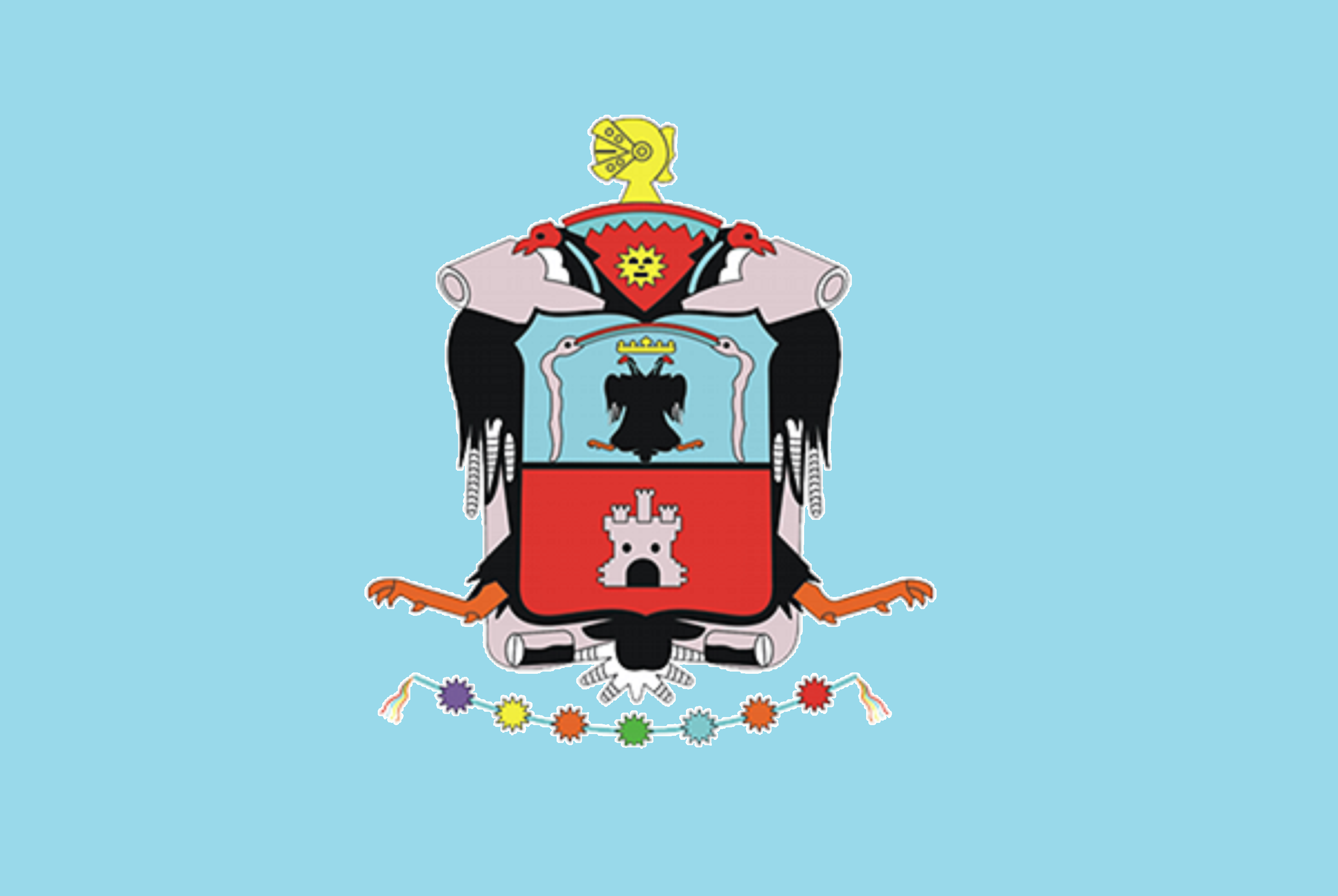 Bandera de la provincia de Canchis, departamento del Cusco, Perú